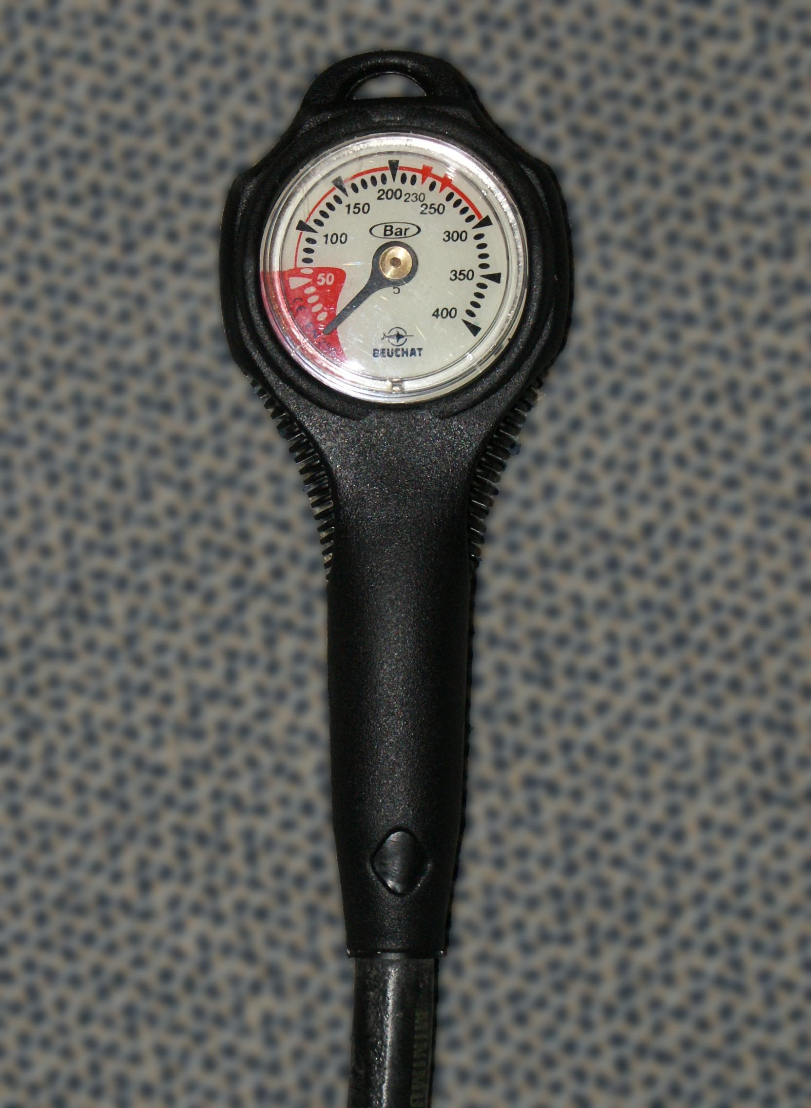 Finimeter wie es von Tauchern gebraucht wird. (Beuchat Finimeter analog 400 Bar)